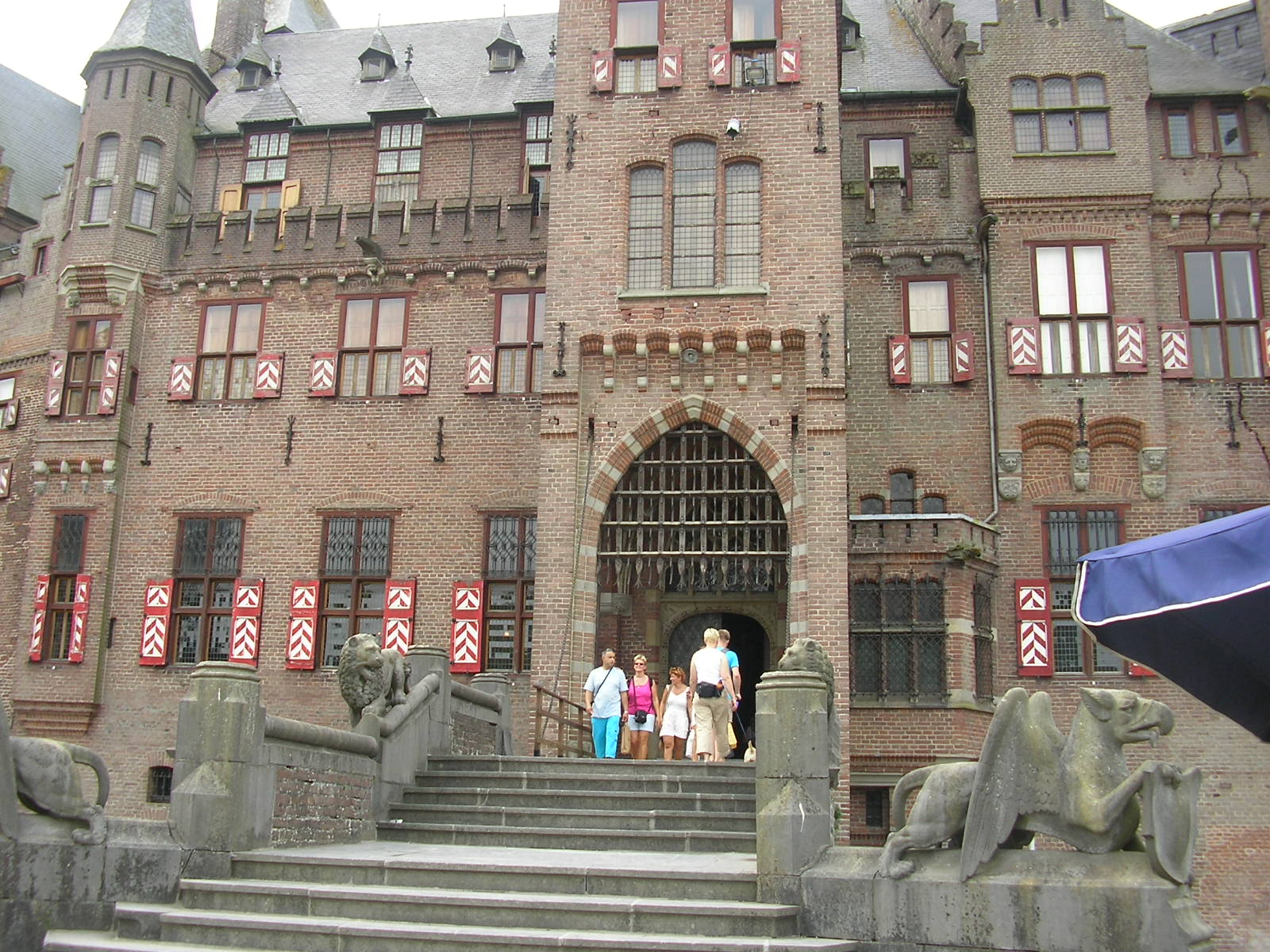 Kasteel De Haar 22 juli 2006 Gemaakt door wikipedia vrijwilliger gijsevers